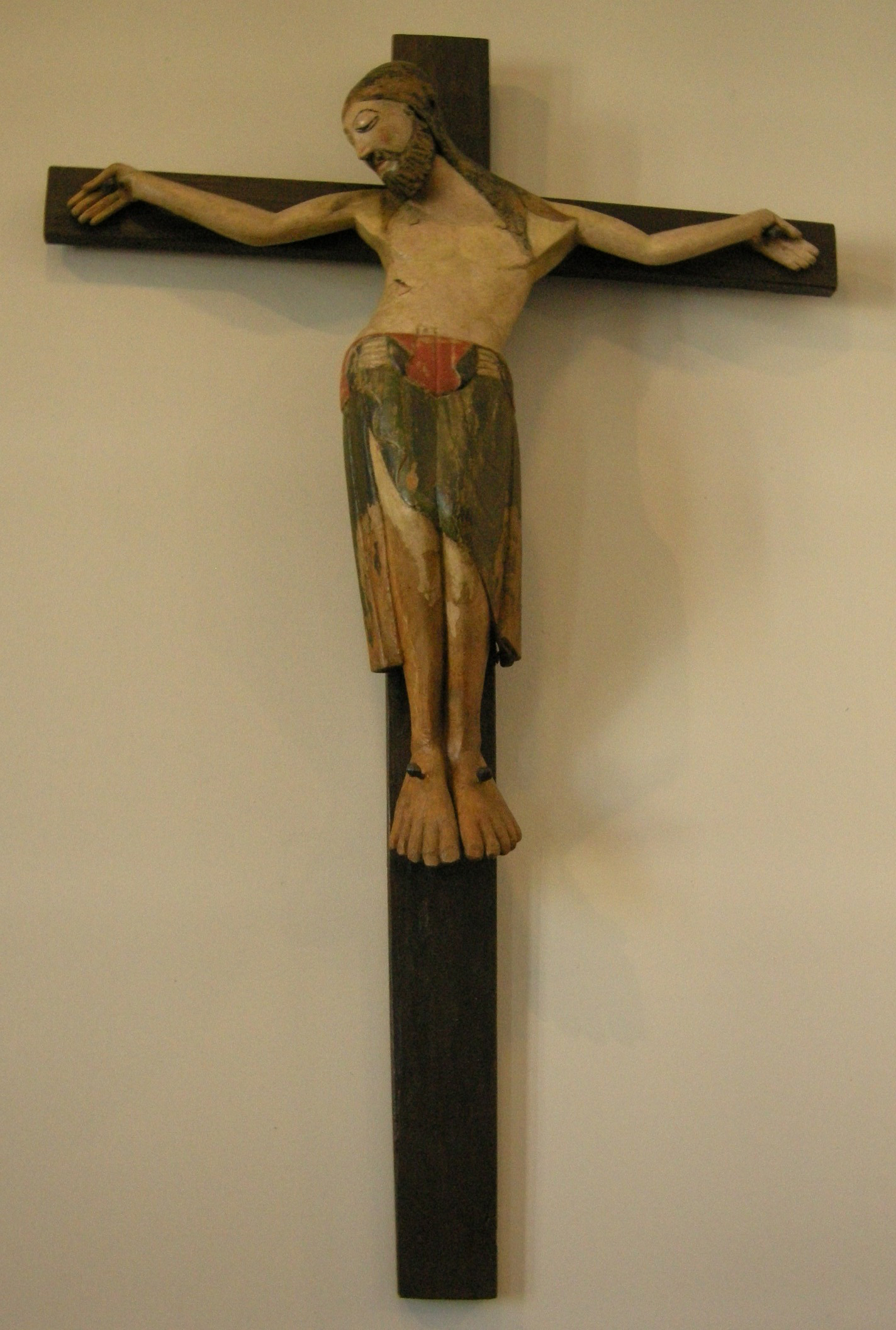 Museo diocesano di klagenfurt, crocifisso del 1180 circa